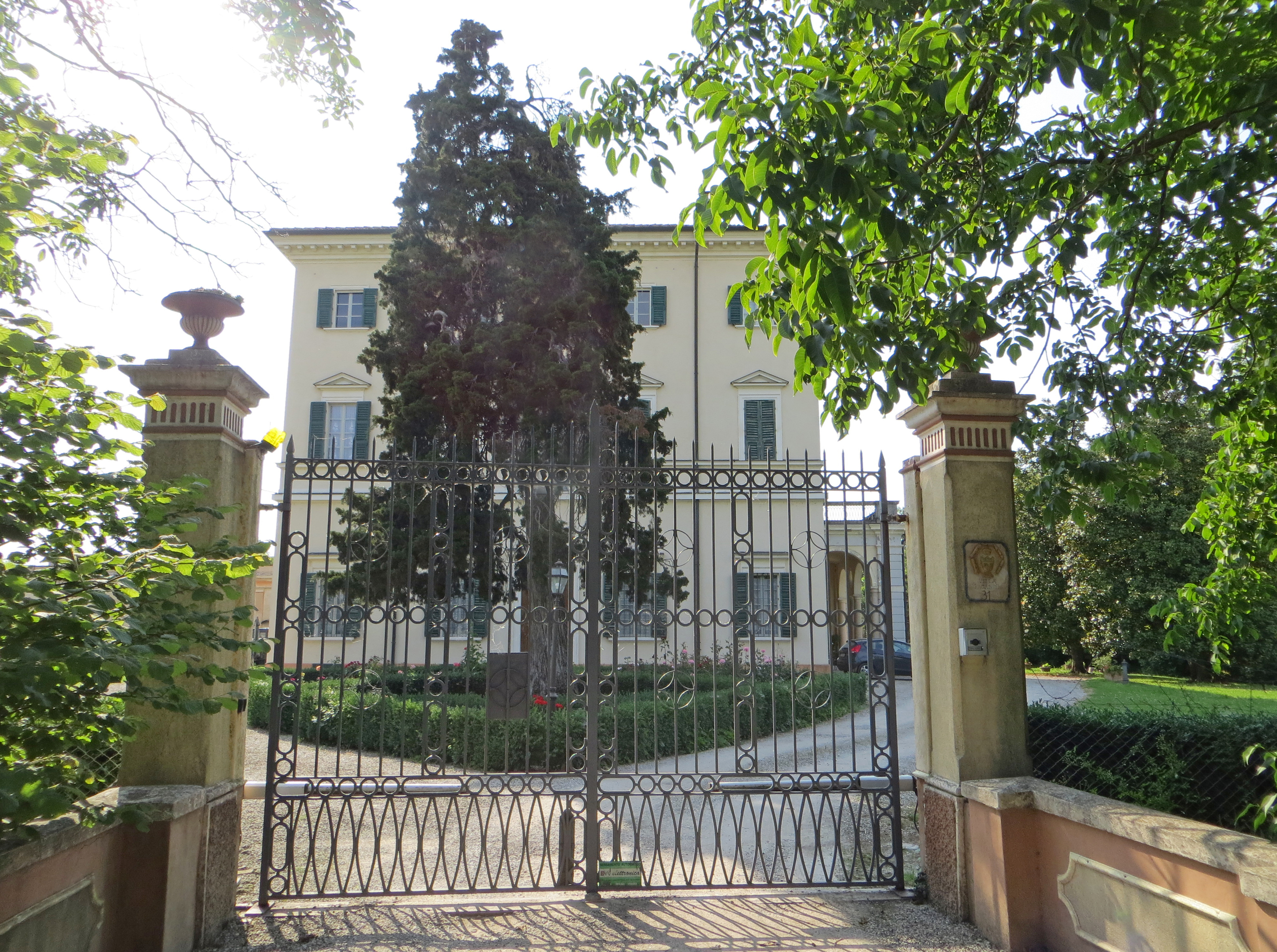 Villa Paganini (Gaione, Parma) - cancellata d'ingresso